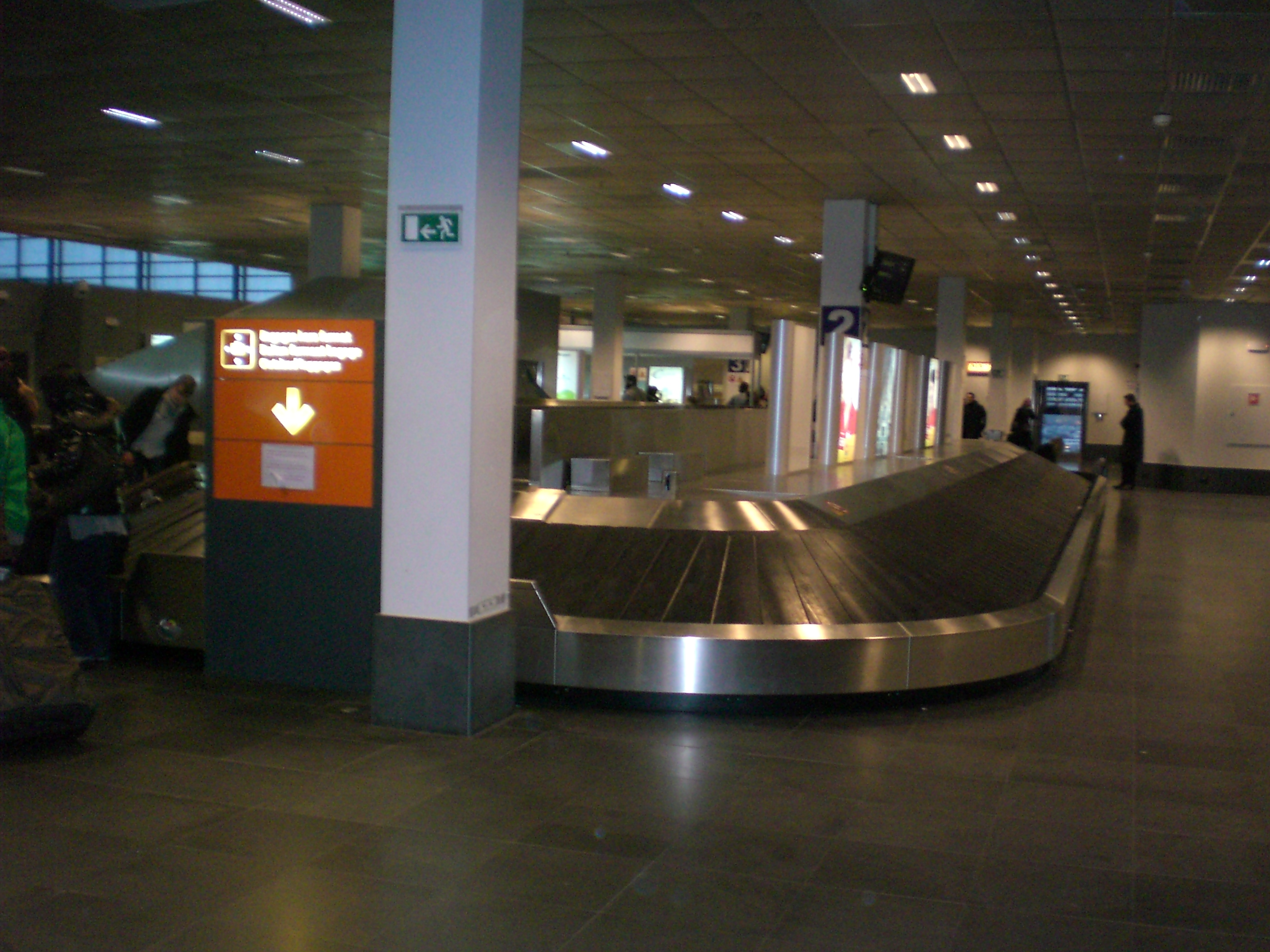 Vue du tapis pour récupérer les bagages